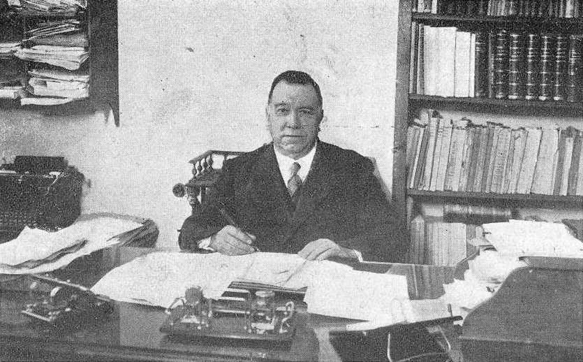 Juan Rof Codina, fotografía en Vida Gallega 1932